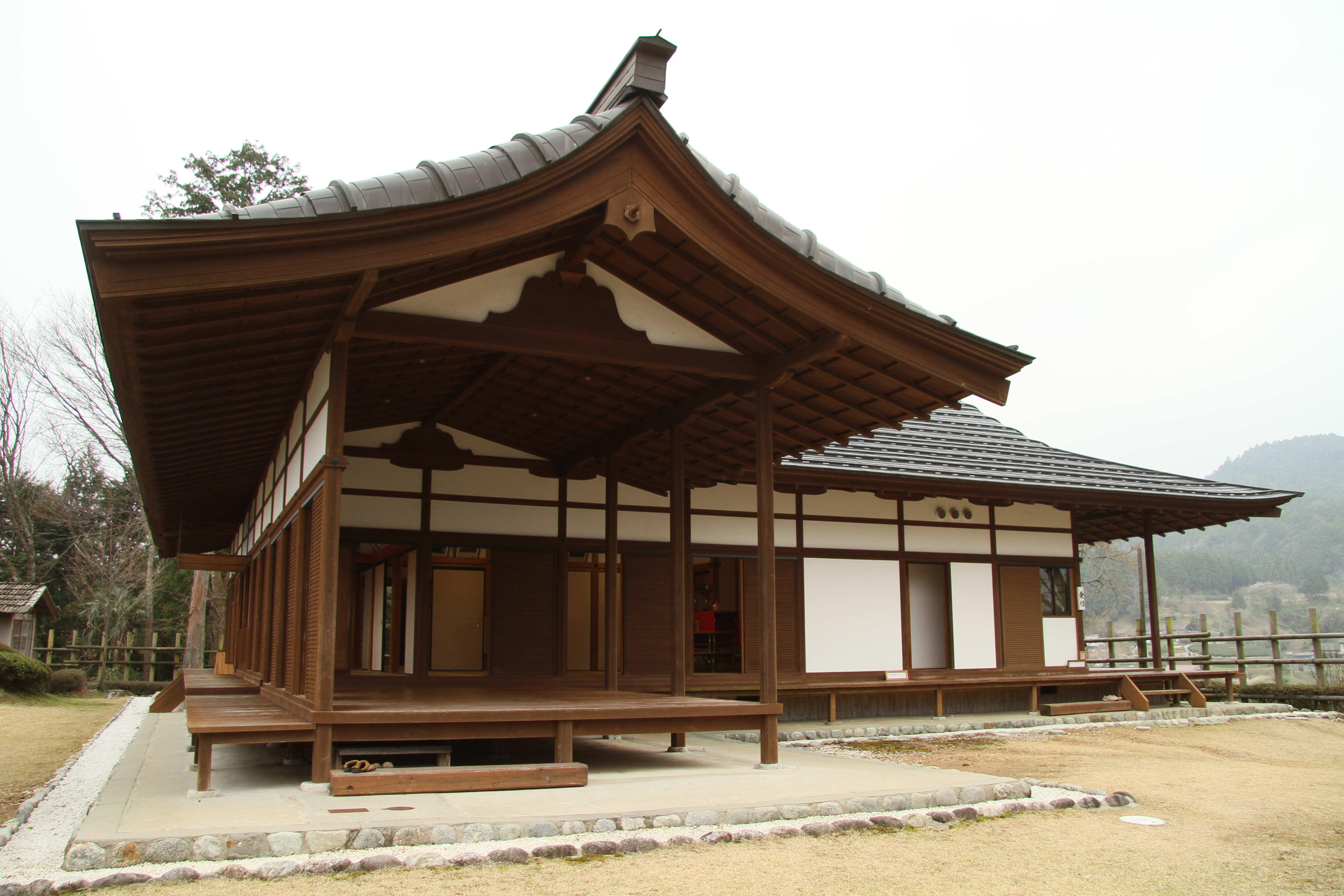 復元された田峰城本丸御殿